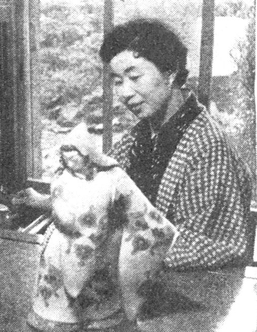 婦人之友社『婦人の友』第54巻第3号（1960）より